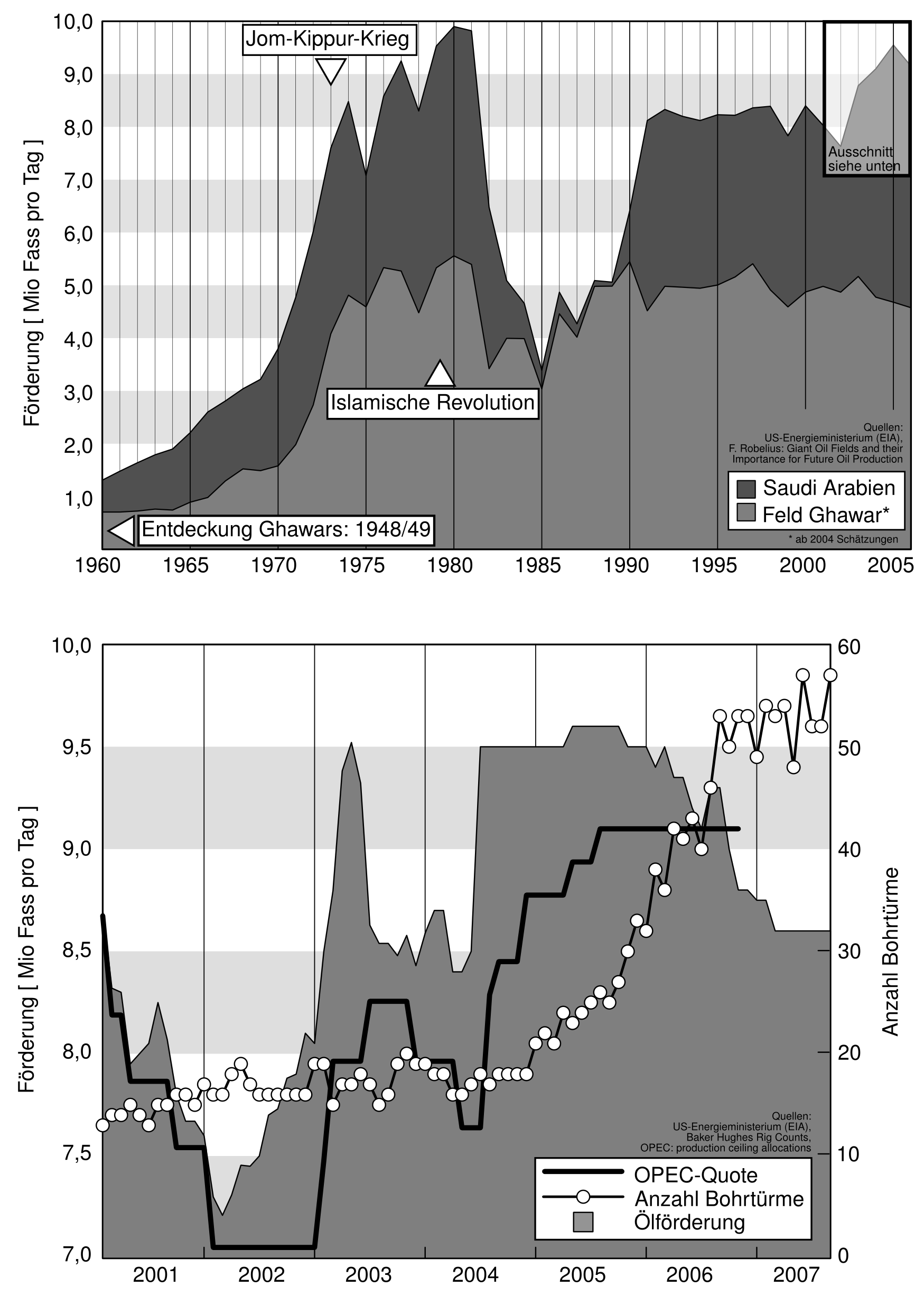 Vergleich zwischen Saudi Arabiens Ölproduktion und der Anzahl an eingesetzten Bohrlöchern